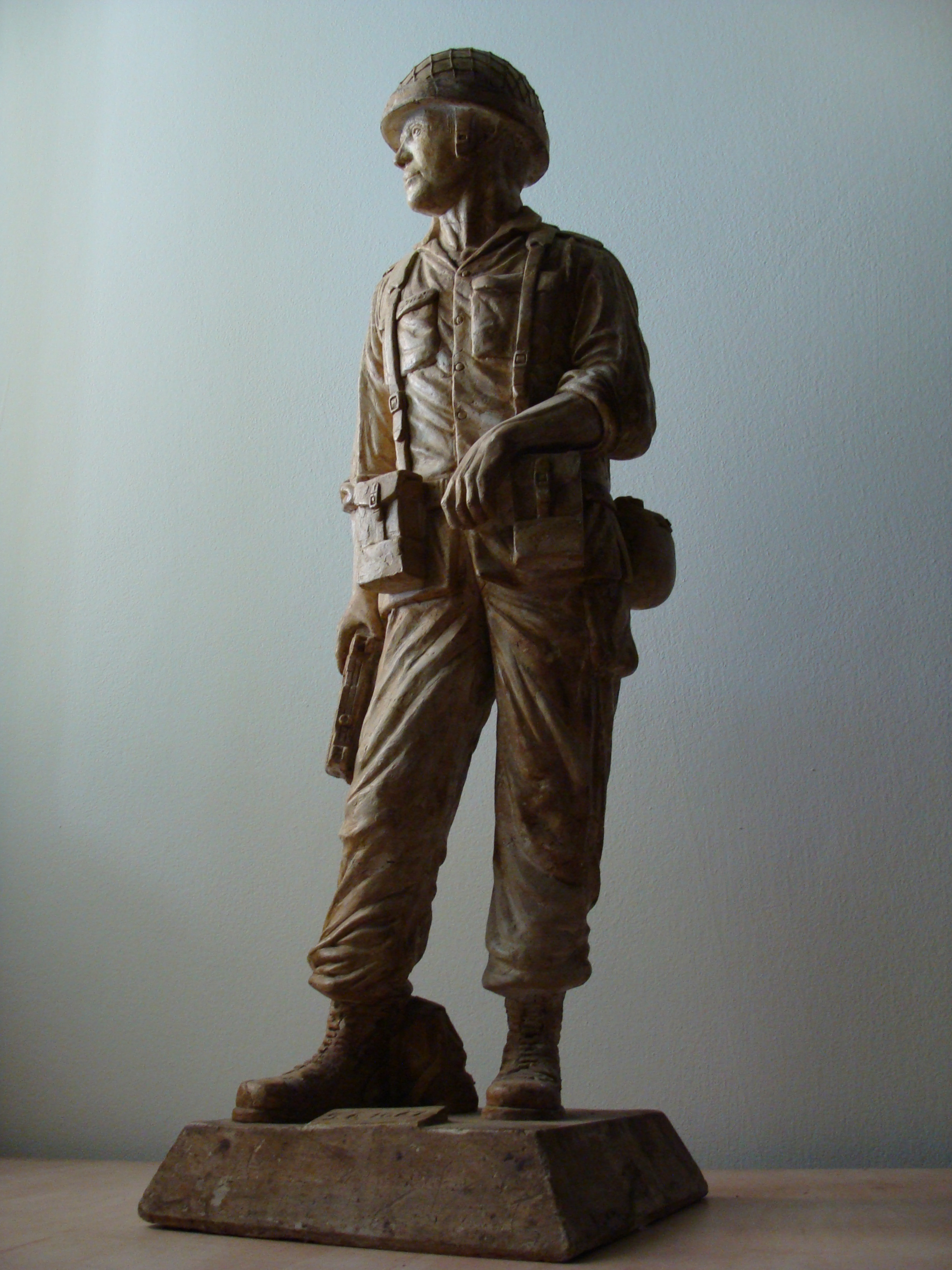 פסל לוחם ששת הימים של דניאל פלנט סופר, גרפיקאי, מאייר